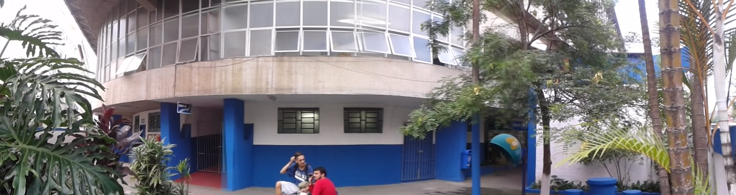 Imagem panorâmica do Ginásio Poliesportivo Pedro Jahara, situado no Centro do Município de Teresópolis.